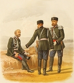 Генеральный Штаб. Генерал в походной форме, Штаб-Офицер в обыкновенной форме и Обер-Офицер в парадной форме. прик. по воен. вед. 1882 г. № 31 и 64. Примечание. Андреевская звезда на шапке полагается при форме Генерального Штаба состоящим при Гвардейских войсках.